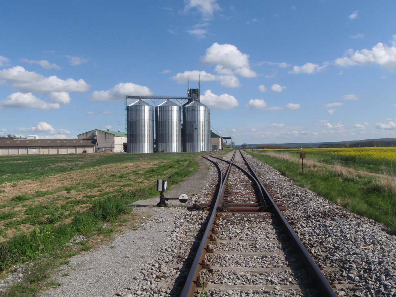 Alsópulya vasútállomása, ma mezőgazdasági terménytároló